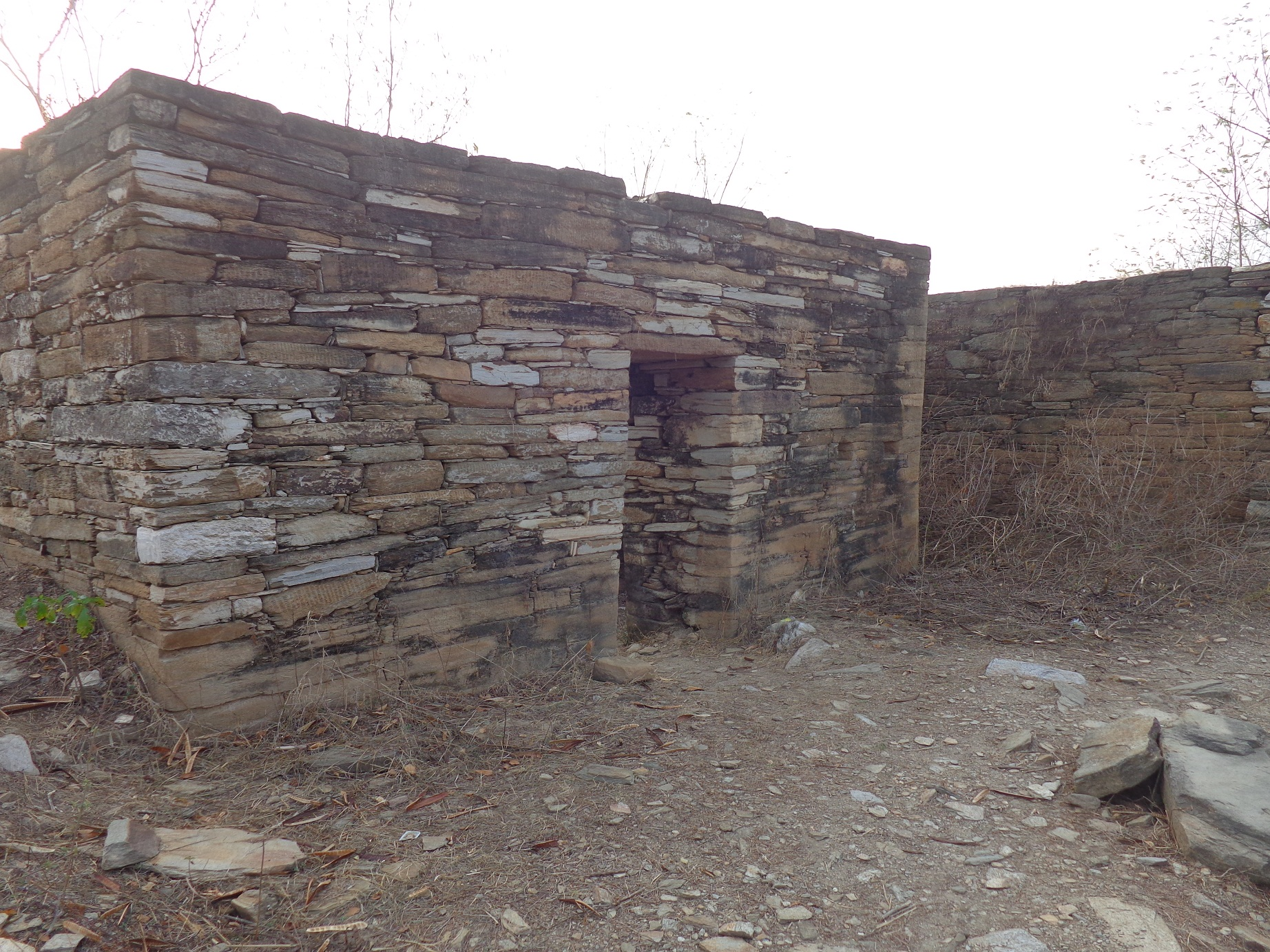 नेपाल भाषा: Doti Raikaa Raja kot-3